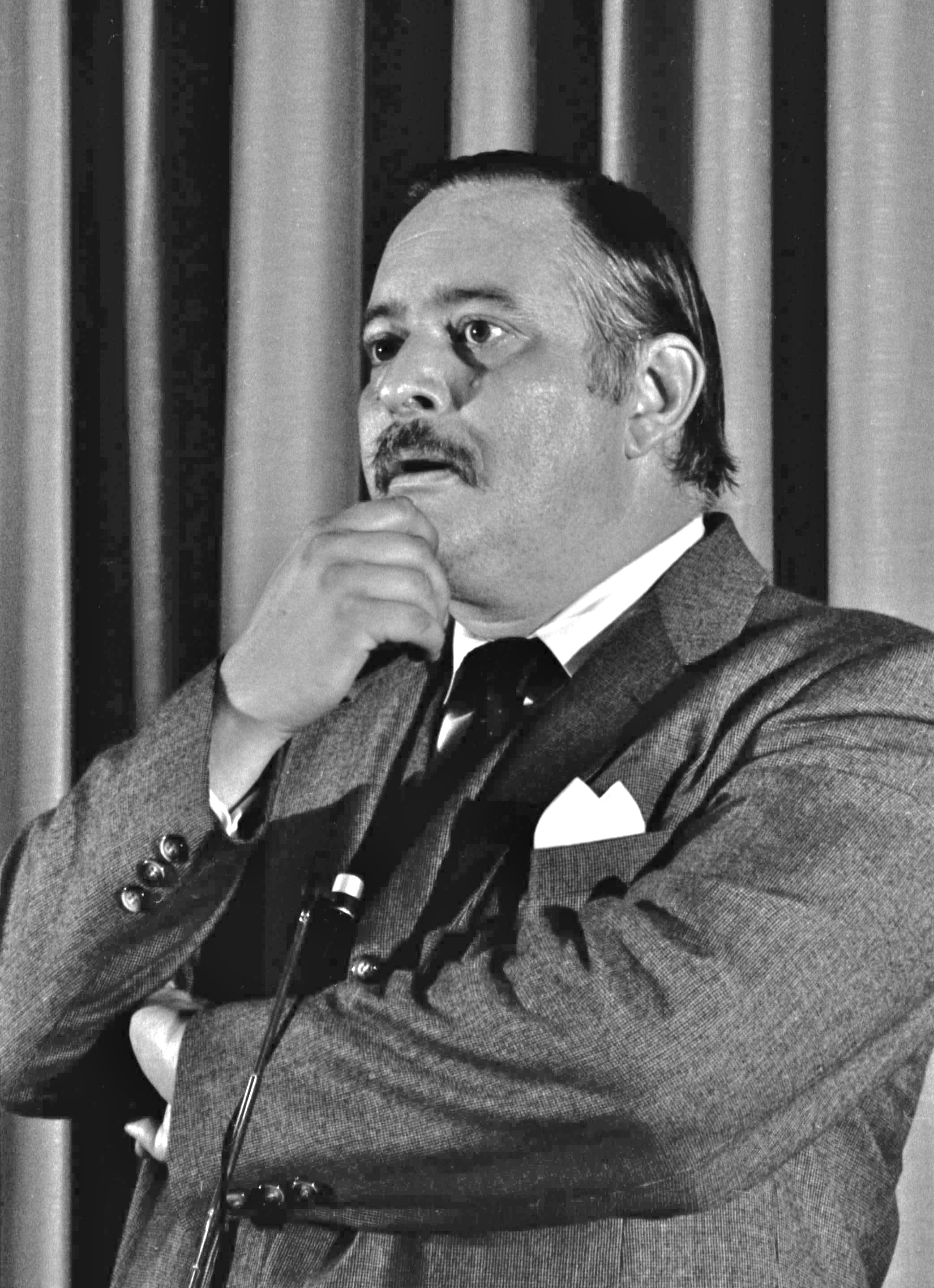 Jacques Parizeau, ministre des Finances, lors d'une conférence à l'université Laval